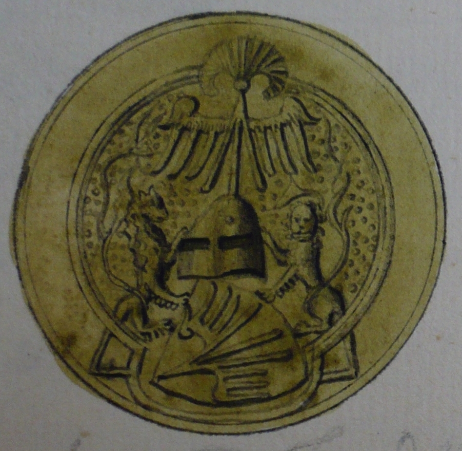 Våpenmerket til Oggmund Finnson